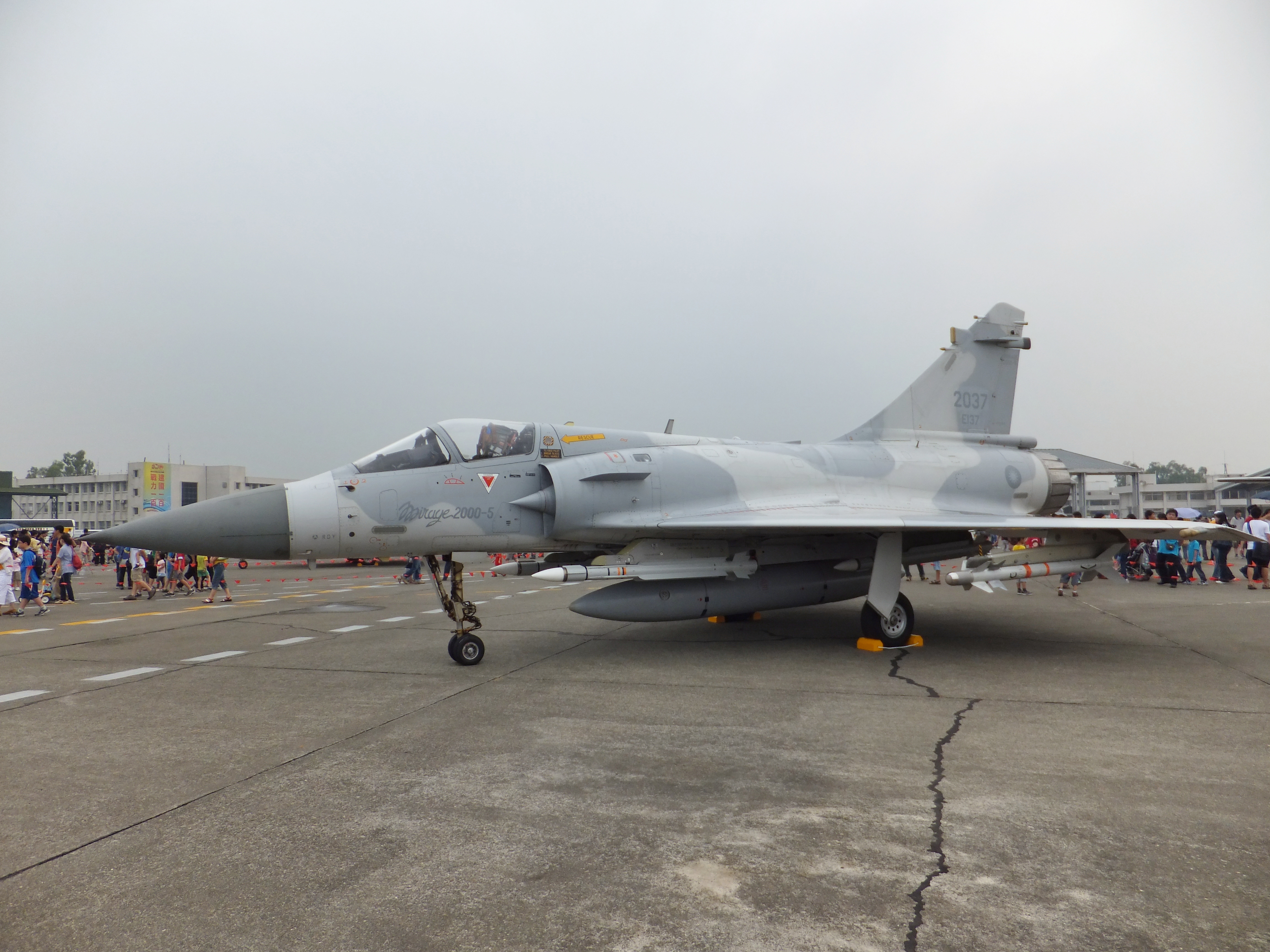 2011年空軍岡山基地營區開放活動中，展示之幻象2000-5EI 2037單座戰鬥機。